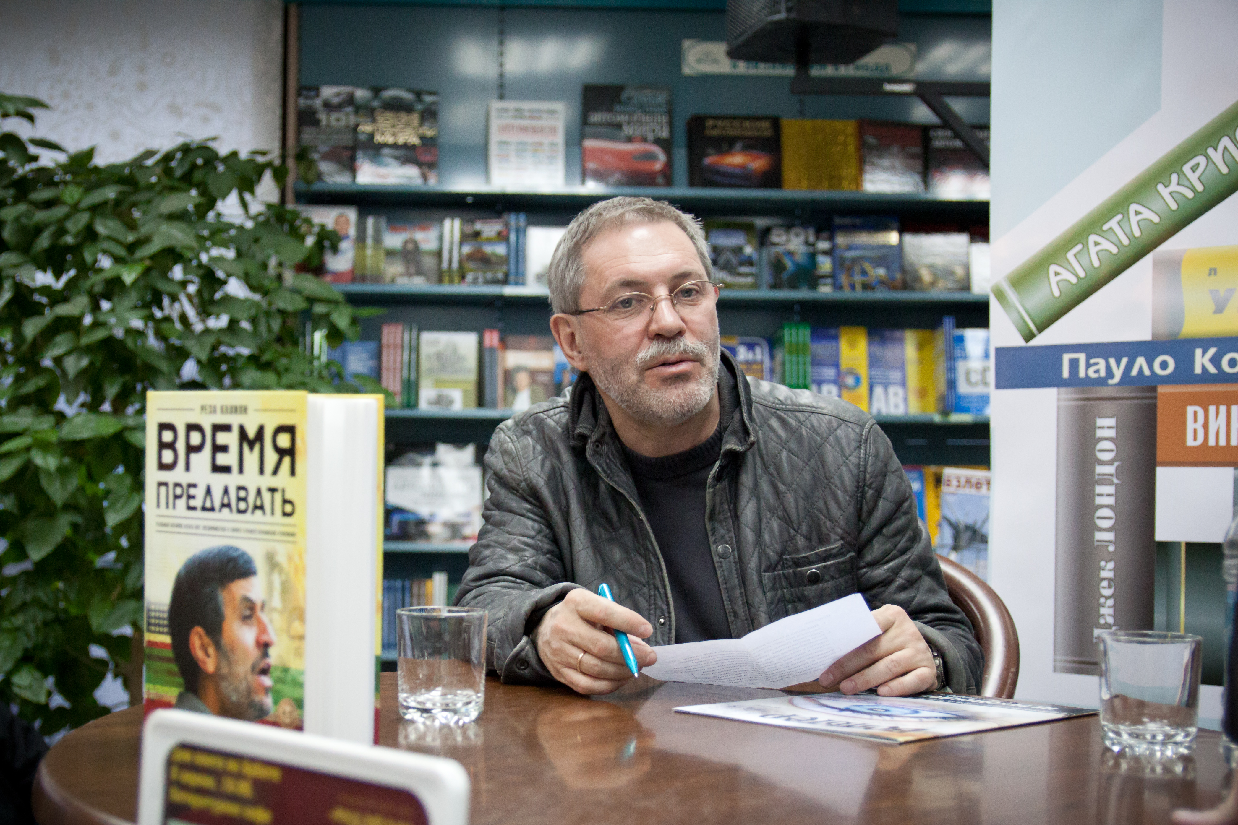 Михаил Леонтьев на презентации книги Вермя предавать